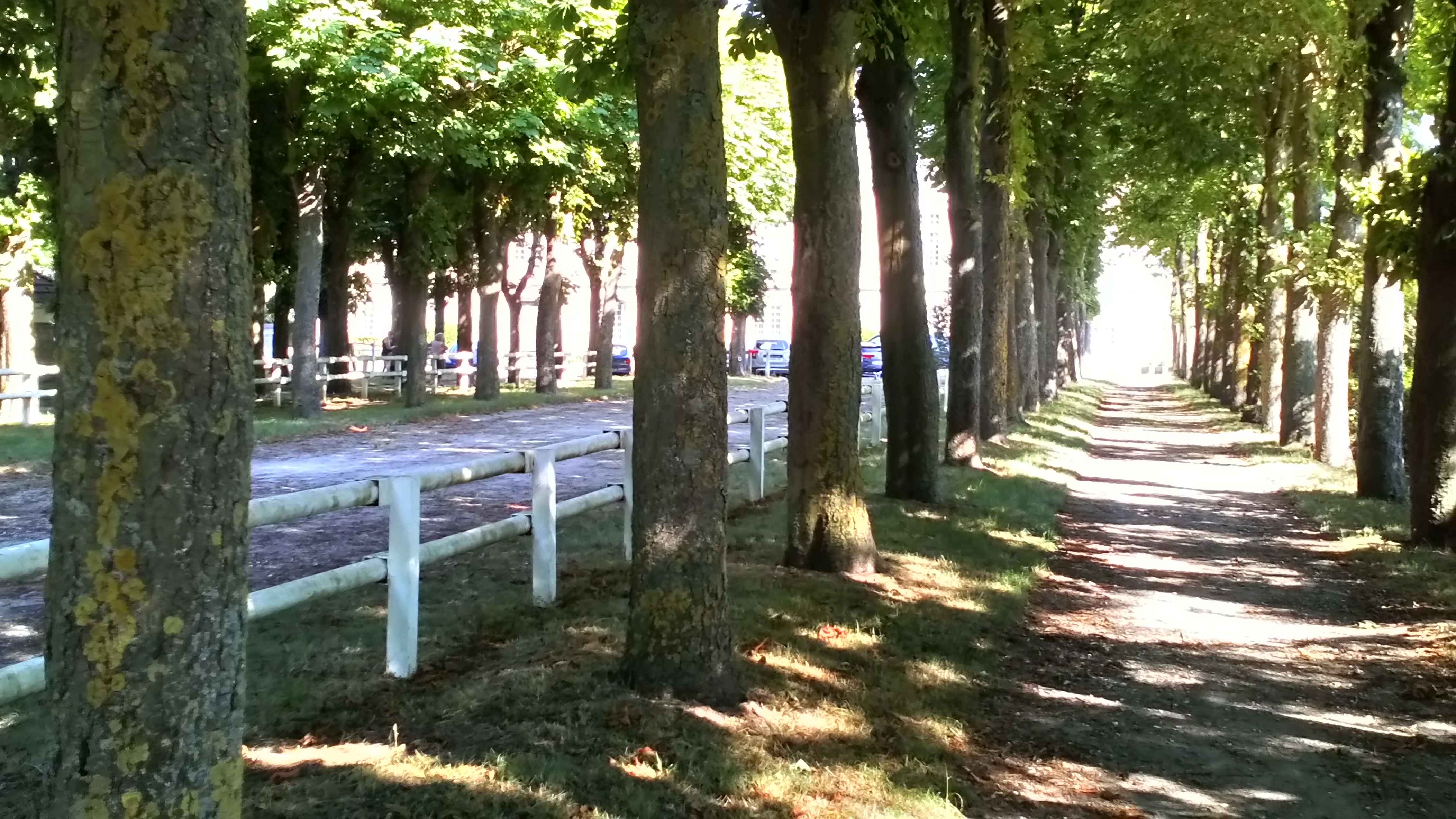 Promenade du prieuré à Montdidier (Somme) 16